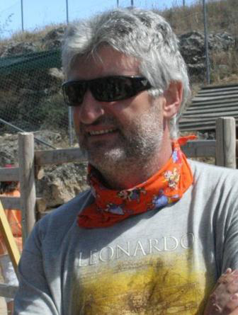 Enrique Baquedano posando en el yacimiento de Pinilla del Valle (2012). Foto tomada por Ángel Herranz